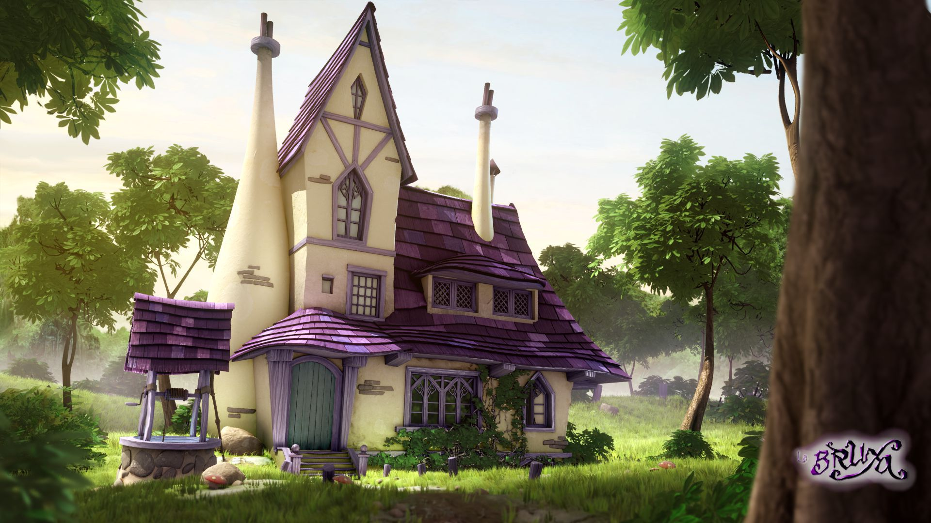 Fotograma del cortometraje "La Bruxa"de Pedro Solís García, ganador del Goya al mejor cortometraje de animación 2011.